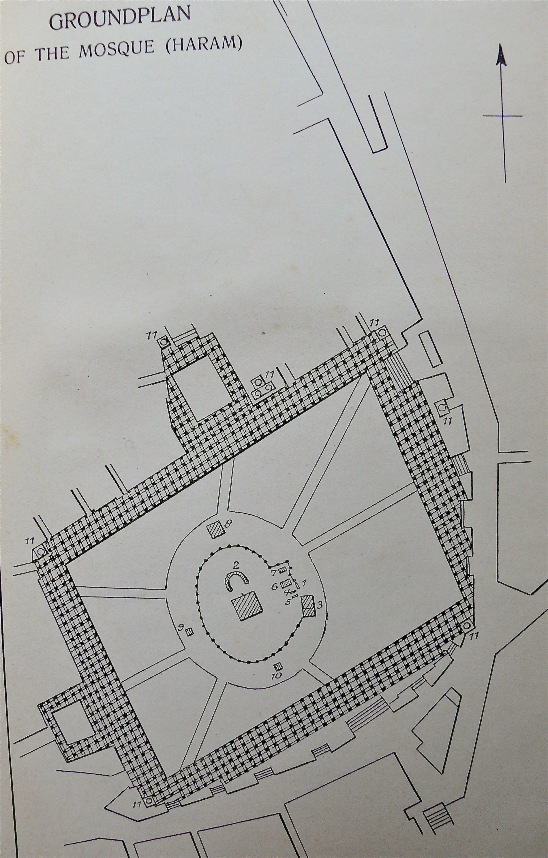 Grundplan des Haram von Mekka